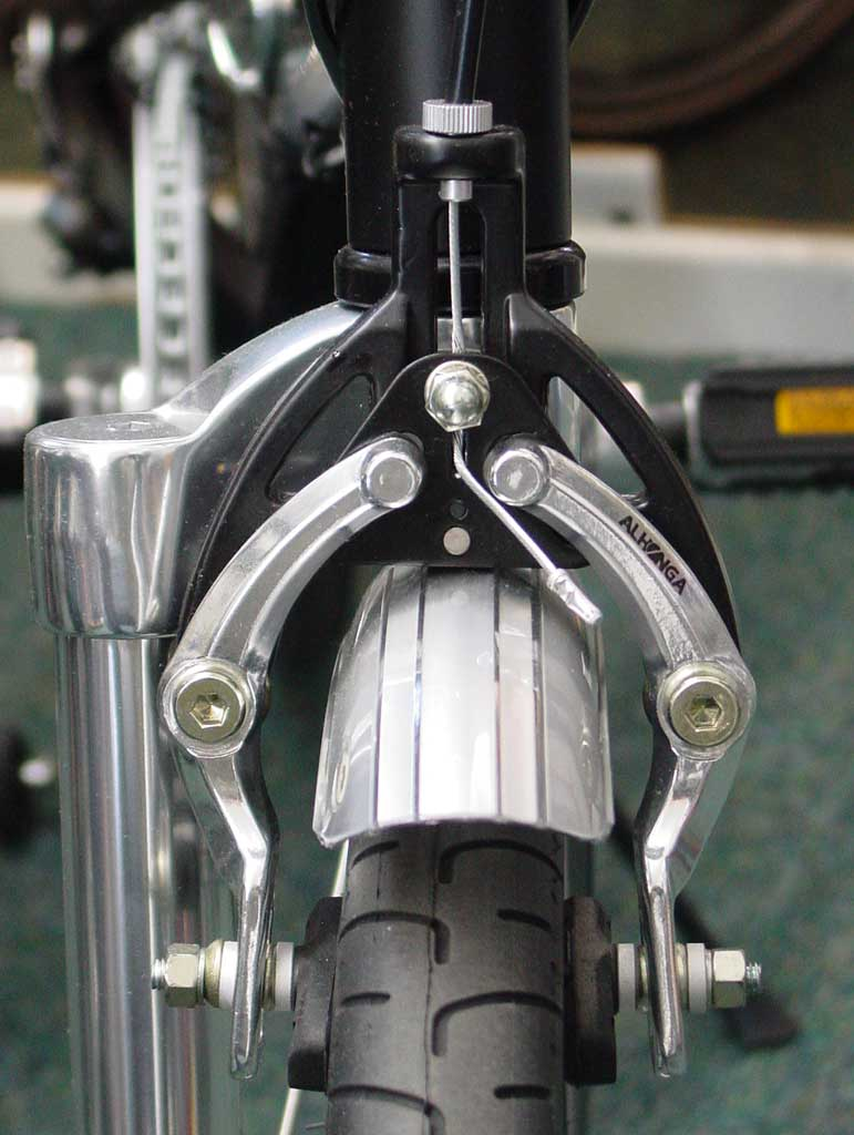 Mittelzugbremse